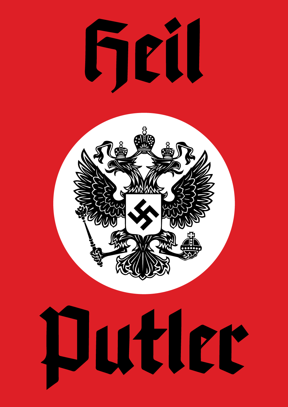 Революційні плакати від strongowski